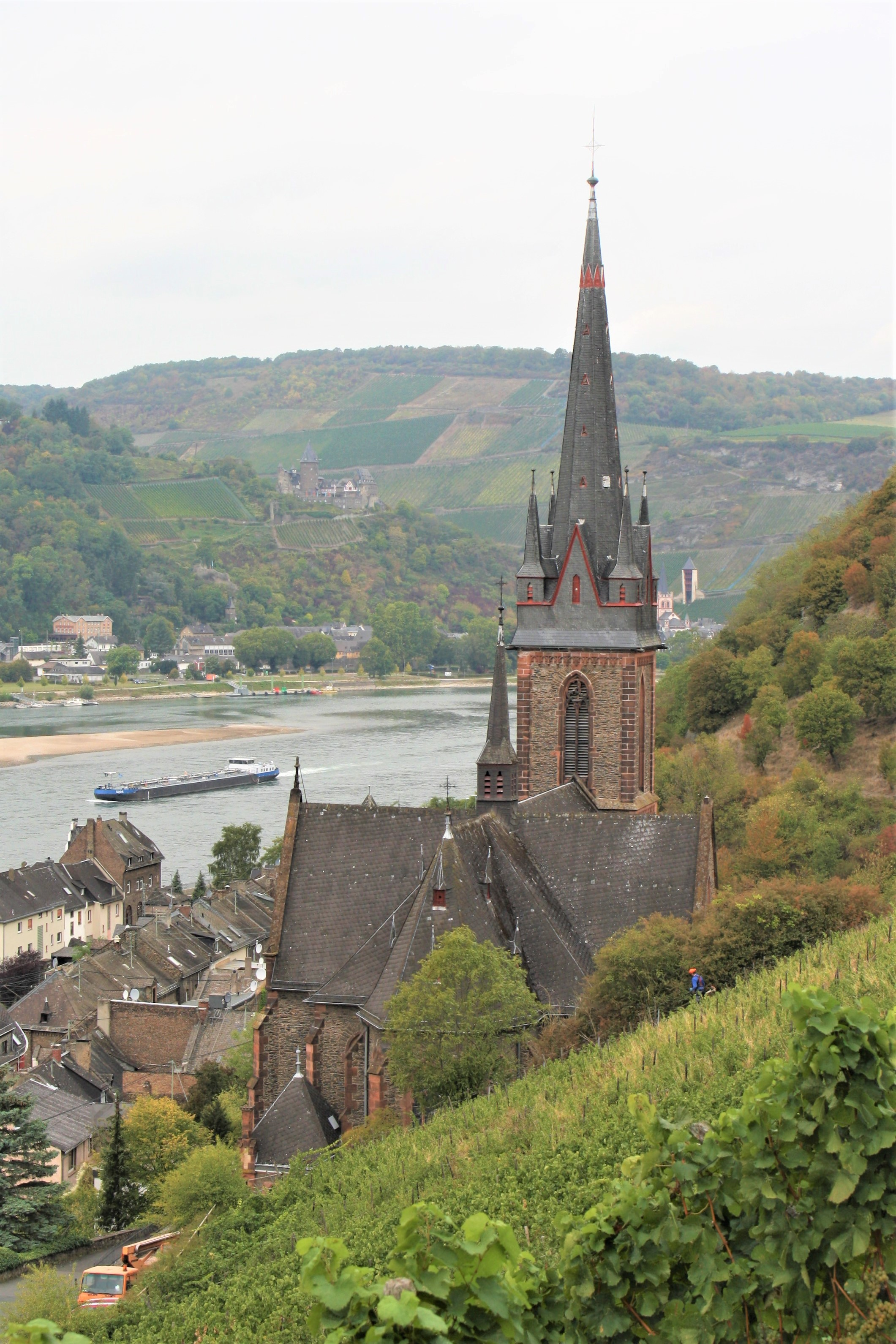 St. Bonifatius, bis 2010 Pfarrkirche von Lorchhausen, von den Weinbergen aus gesehen